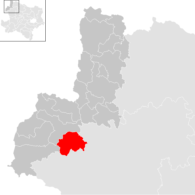 Bezirk Gmünd